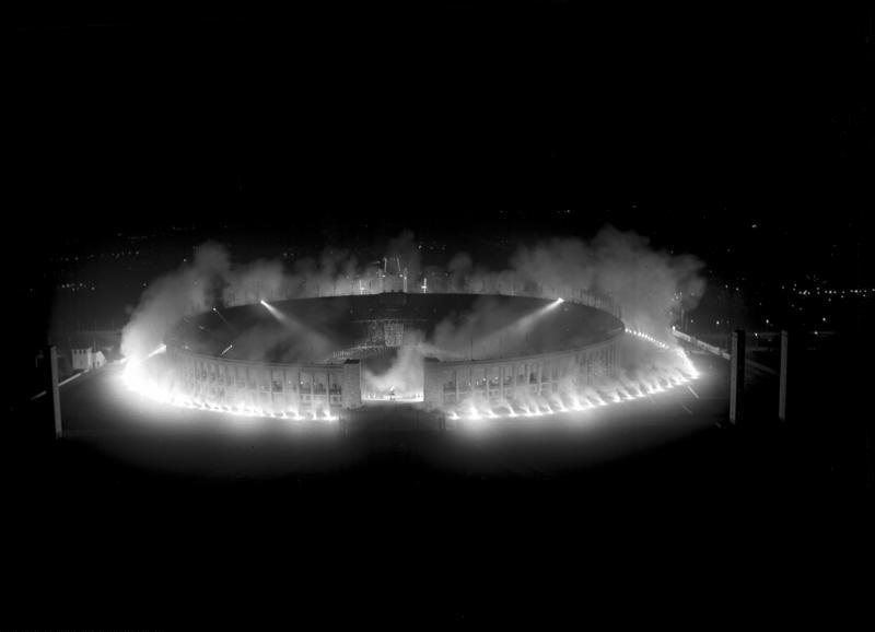 Berlin Olympiade 1936